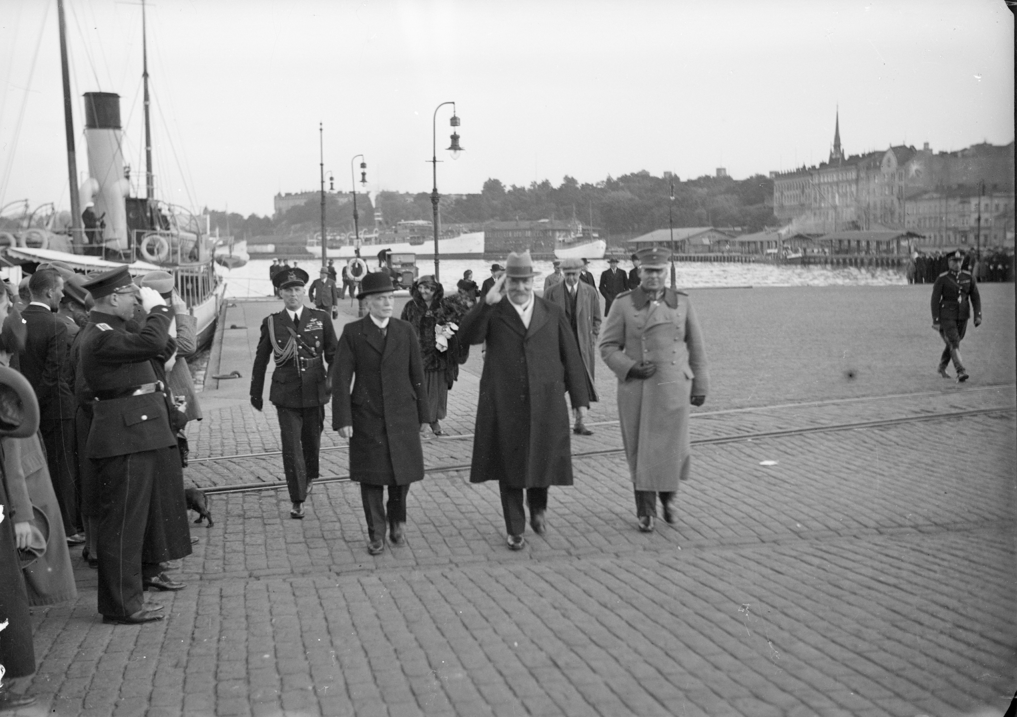 Presidentti Svinhufvud Kauppatorilla virkaanastujaispäivänä 3.3.1931, taustalla Ellen Svinhufvud